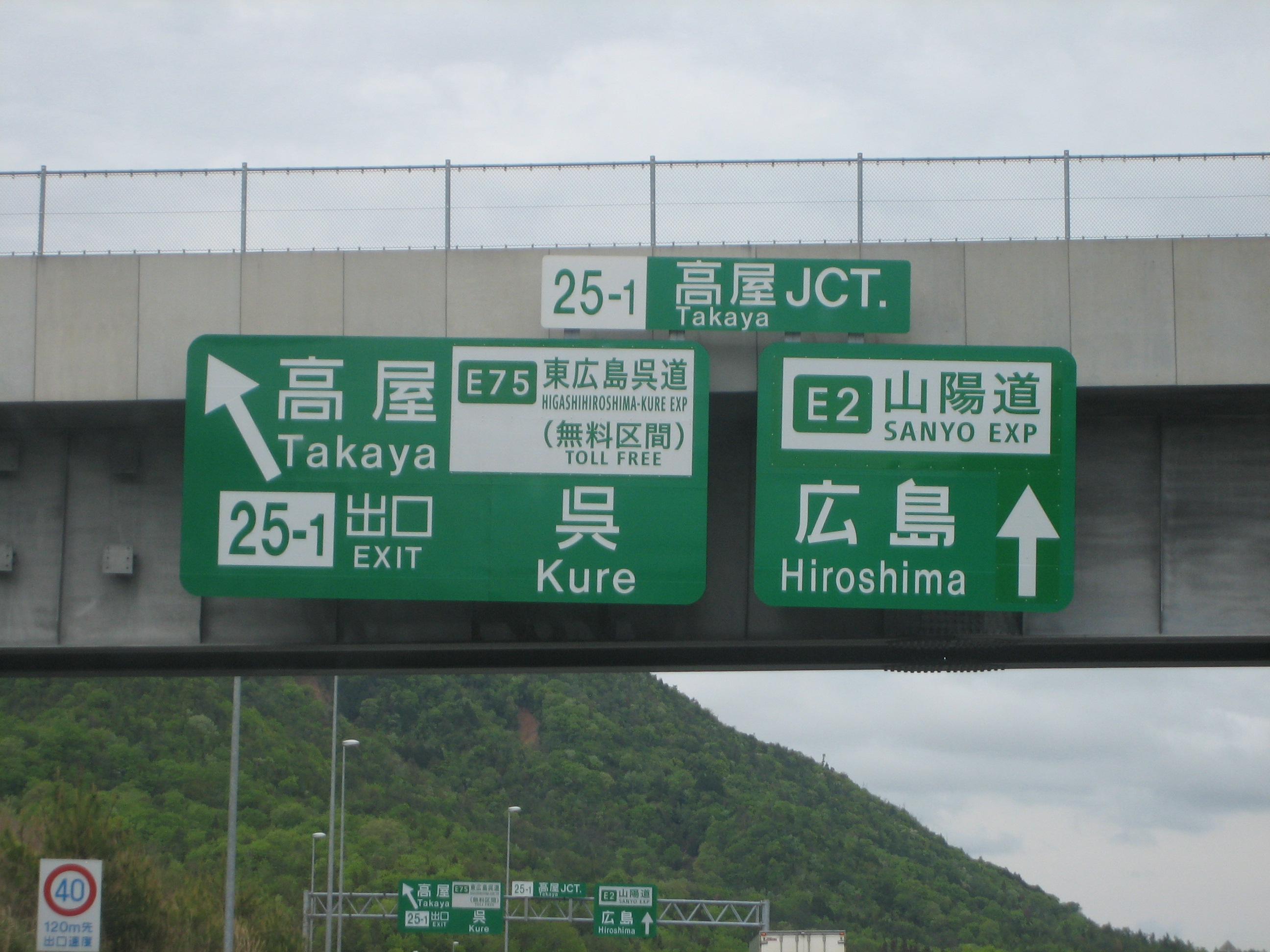 高屋JCT